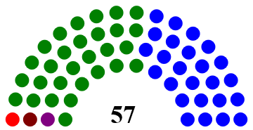 Composicion de la Asamblea Legislativa en ese periodo